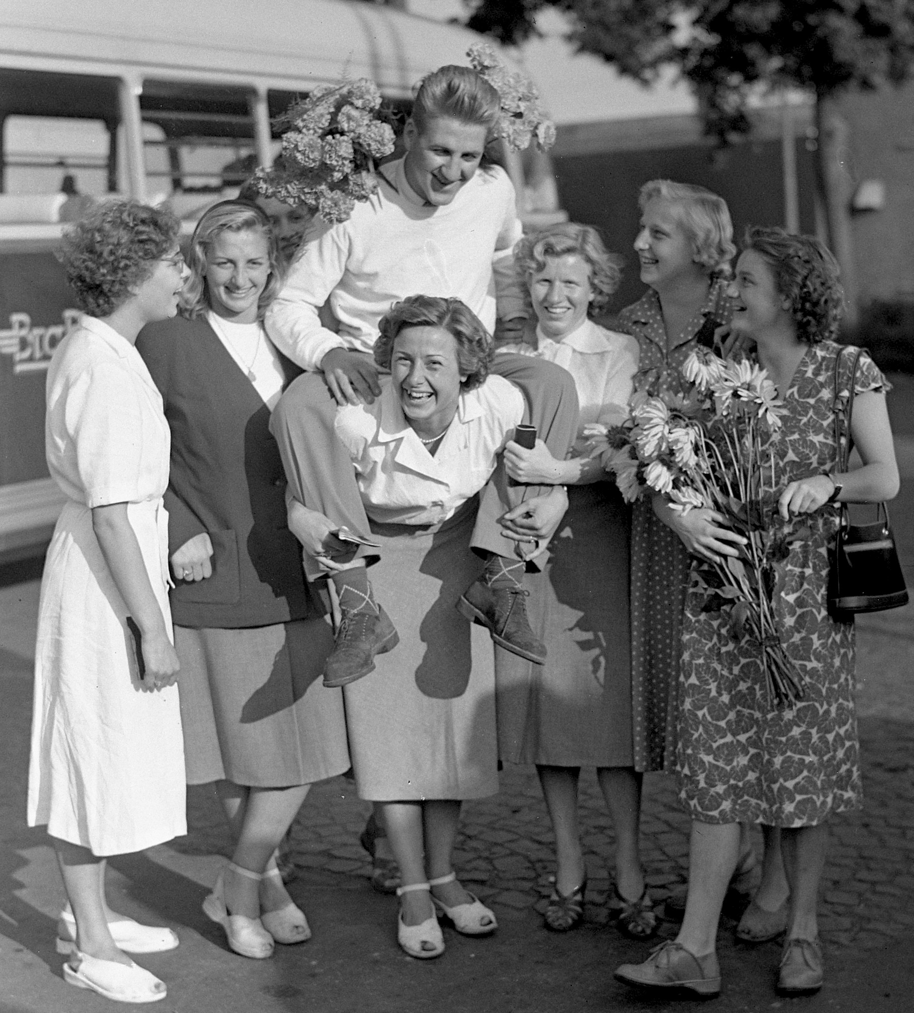 De Europese kampioenschappen werden van 26-29 augustus gehouden in Wenen. Nederland won 4 gouden, 4 zilveren en 3 bronzen medailles. In het midden Cornelis (Kees) Kievit (zilver 100m rug). De zwemsters: Irma Schumacher (goud 100m vrij, zilver 400m vrij, midden met op haar schouder Kievit, Marie Louise Linssen-Vaessen (zilver 100m vrij, niet op foto?), Hendrika (Ria) van der Horst (goud 100m rug, 2 van links), Greet Galliard (brons 100m rug), Lies Bonnier (zilver 200m school, 3e van rechts), Jannie de Groot (brons 200m school, 2e van rechts?). Verder deden nog mee aan de estafette 4x100 vrij (goud) Ann Masser (geheel rechts?) en Johanna Termeulen (geheel links). In ieder geval niet op de foto Joris Tjebbes, die brons won op de 100m vrij.